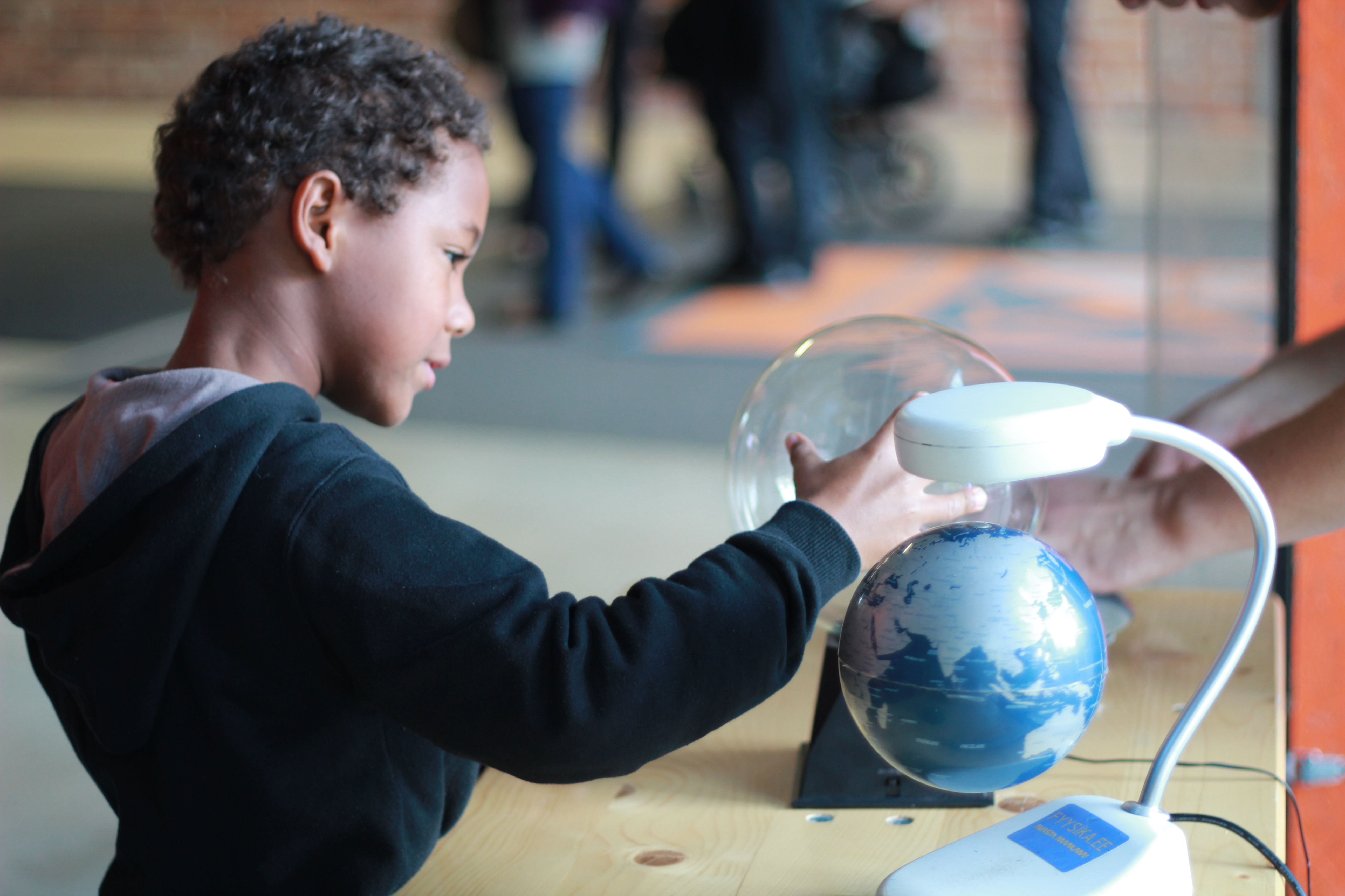 Uudishimulik Teadusbuss Ahhaas teadusfestivali külastaja uurimas plasmakera. Eespool magnetväljaga balansseeritud õhus leviteeriv gloobus.